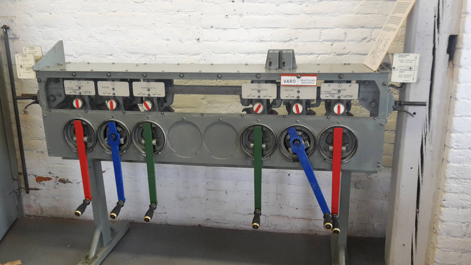 Ristimäen kampiasetinlaite on esillä Suomen Rautatiemuseossa.